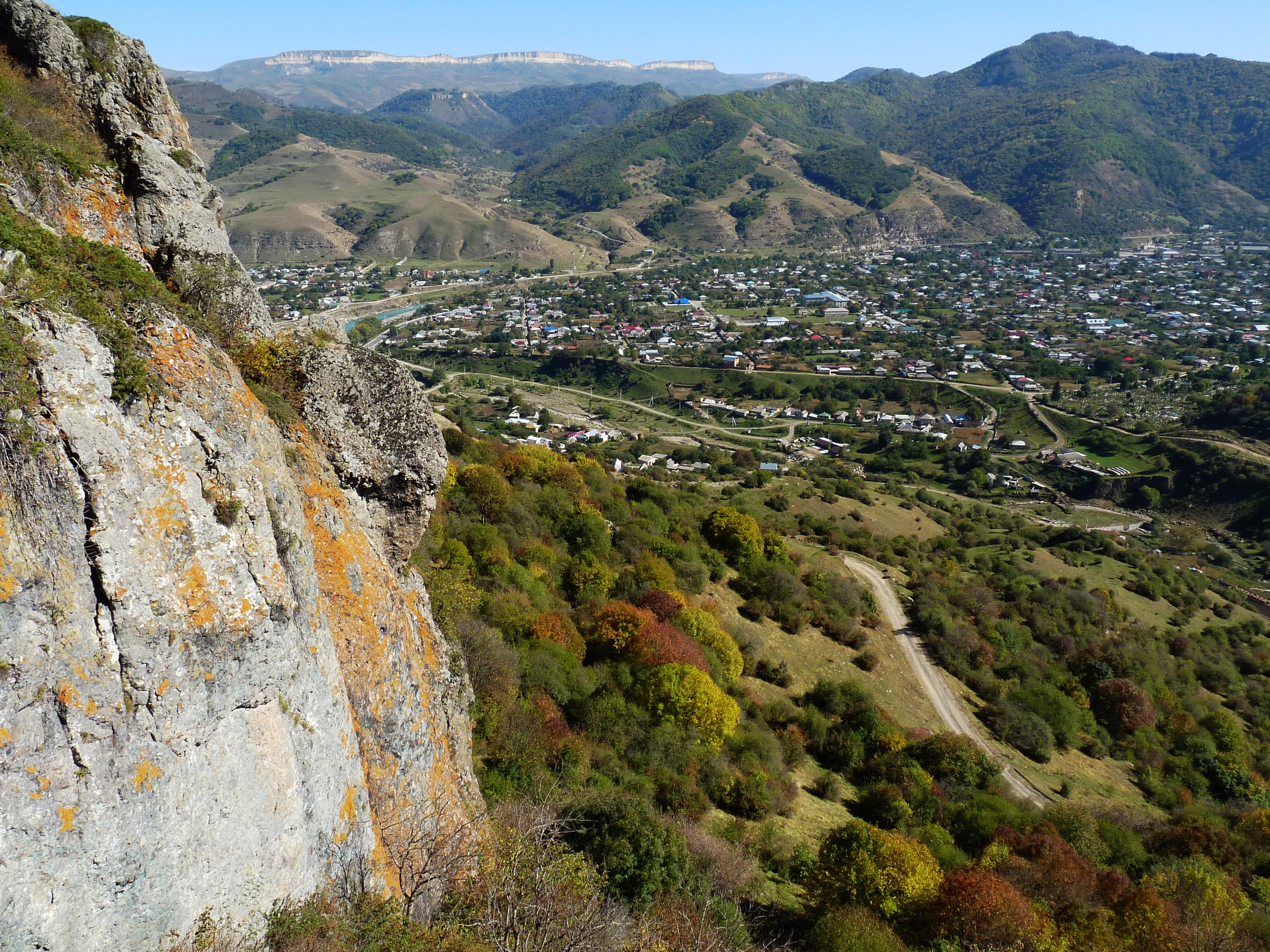 Теберда, Карачаевск This image is related to the protected area of Russia number 0900023